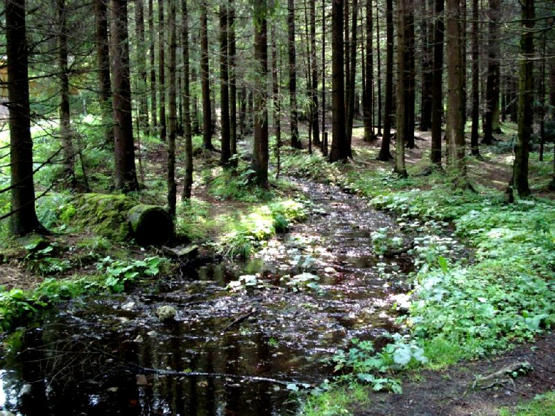 Droga pod Reglami w Zakopanem.